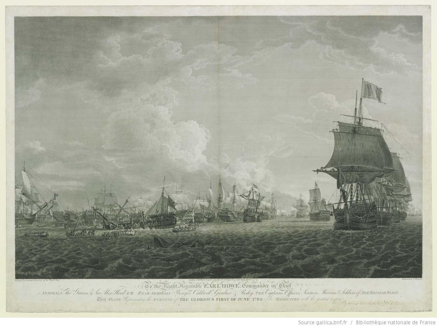 Gravure anglaise de 1795 mettant en scène les combats de Prairial en 1794. Au centre, le vaisseau français le Vengeur en train de couler.